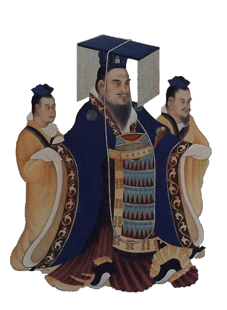 中文（中国大陆）: 汉武大帝